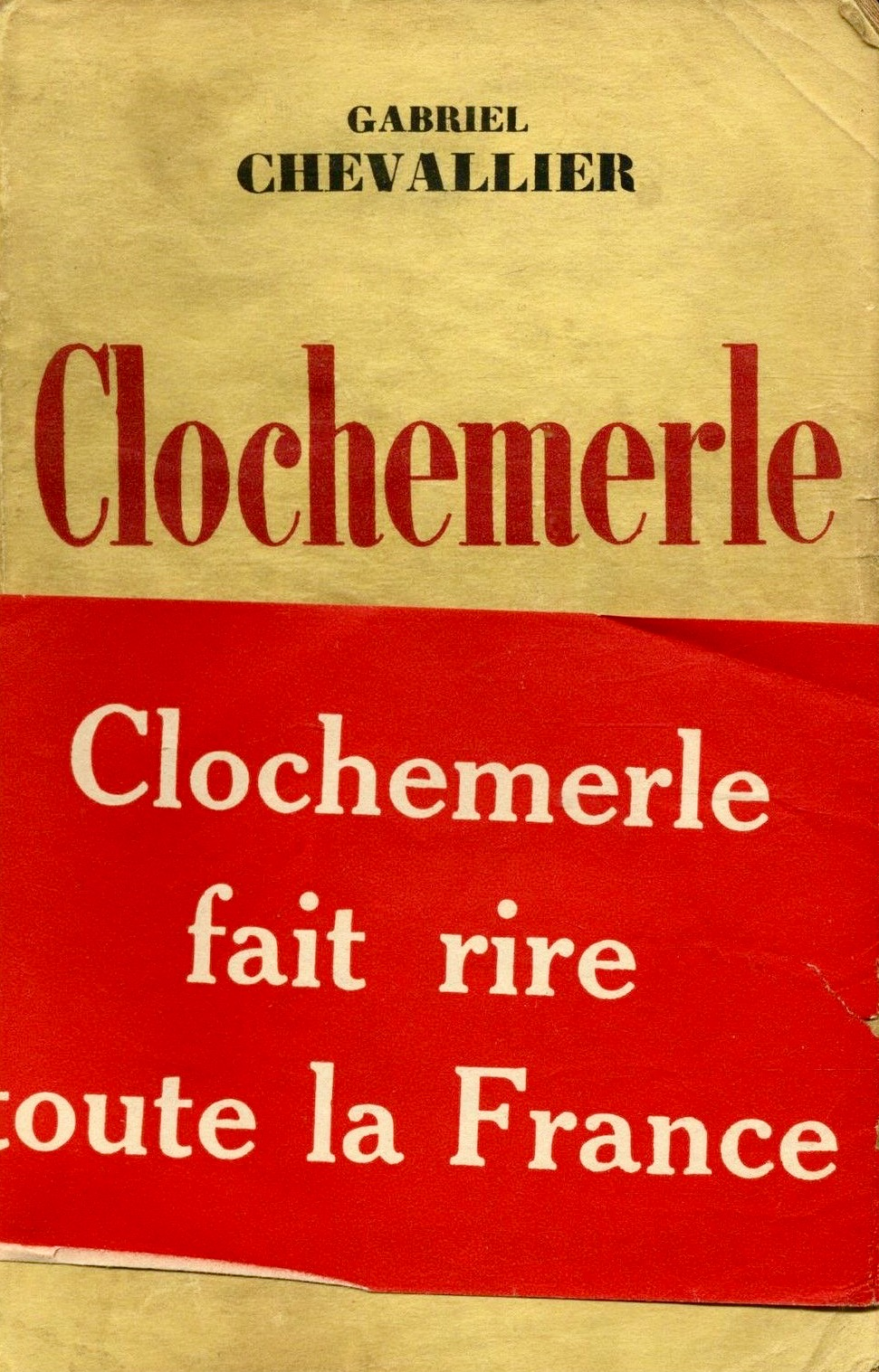 Gabriel Chevallier, Clochemerle, couverture